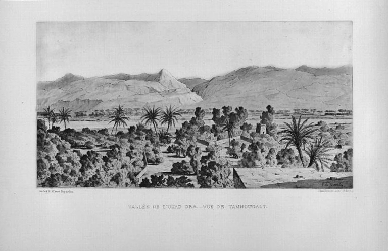 Fotograbado de la obra Reconnaissance au Maroc (1883-1884), de Carlos de Foucauld, que ilustra el valle del río Draa.